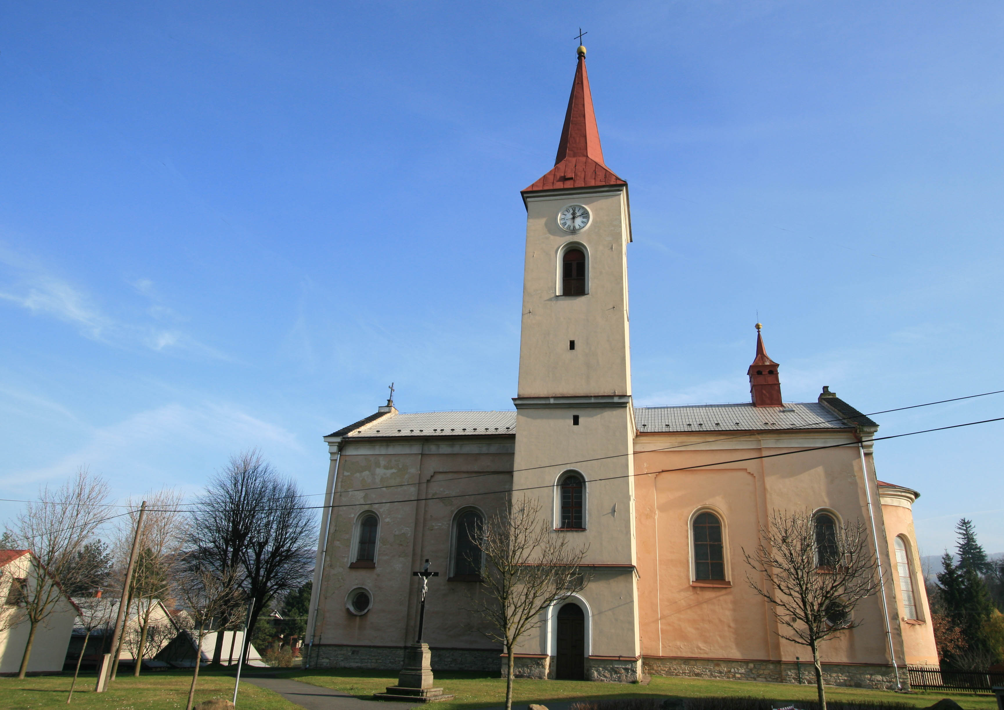 Kostel zasvěcený Panně Marii v Ženklavě